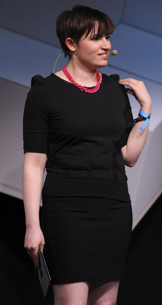 Laurie Penny 2013